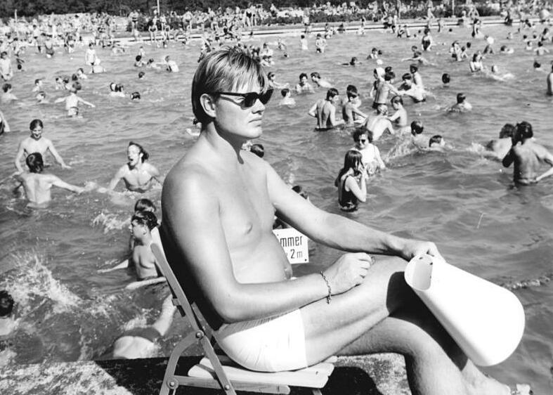 Zentralbild-Franke-29.7.69-sze-Berlin: Verantwortung für 120 000 Badelustige trug Günter Wieczchowski, leitender Schwimmeister vom Freibad Pankow, in den vergangenen zehn Tagen. Unermüdlich wacht er darüber, daß die Badeordnung einghalten wird und vor allem Kleinkinder nicht die Nichtschwimmergrenze überschreiten.